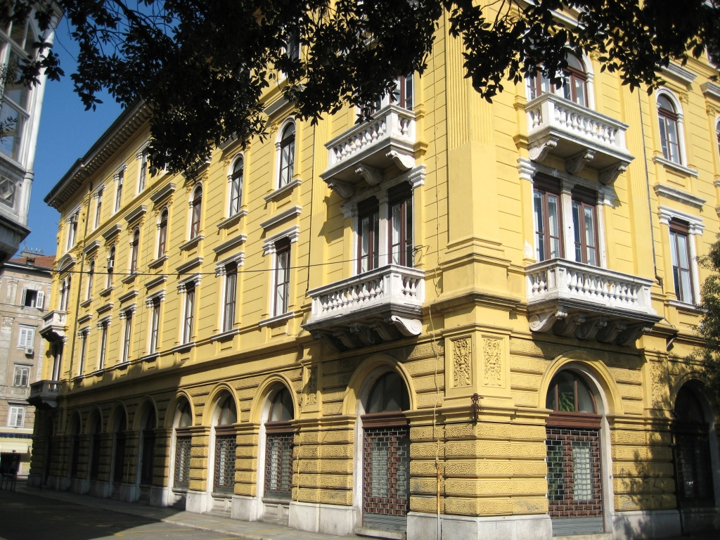 Zgrada Administracije u Rijeci.